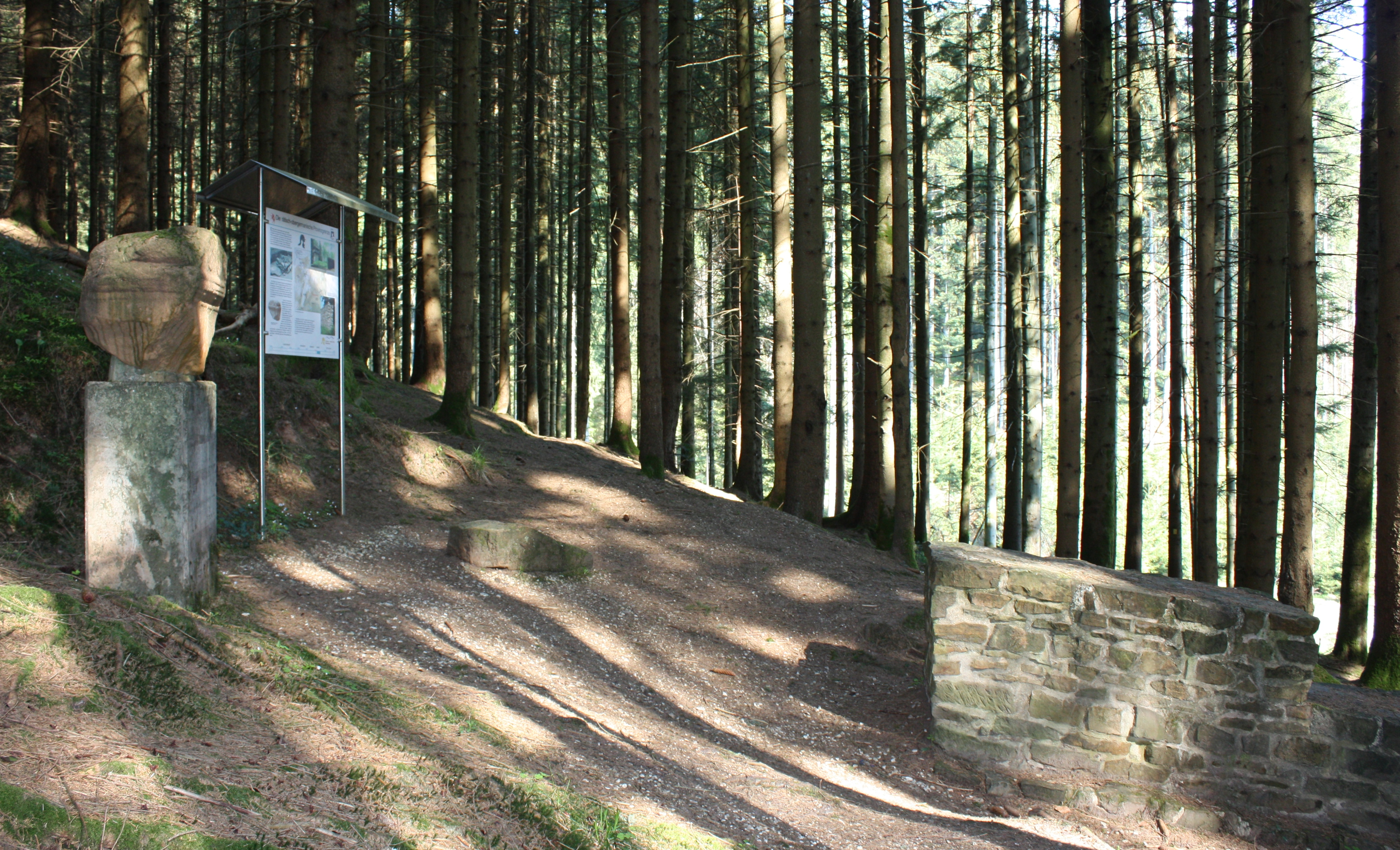 Nahstelle zwischen Obergermanischen und Raetischen Limes im Rotenbachtal (Schwäbisch Gmünd). Am linken Bildrand eine Nachbildung des 1894 ausgegrabenen Altarsteines aus Stubensandstein. Rechts ein rekonstruiertes Stück der raetischen Limesmauer. Hinter der Informationstafel der Wall und Graben des Obergermanischen Limes.